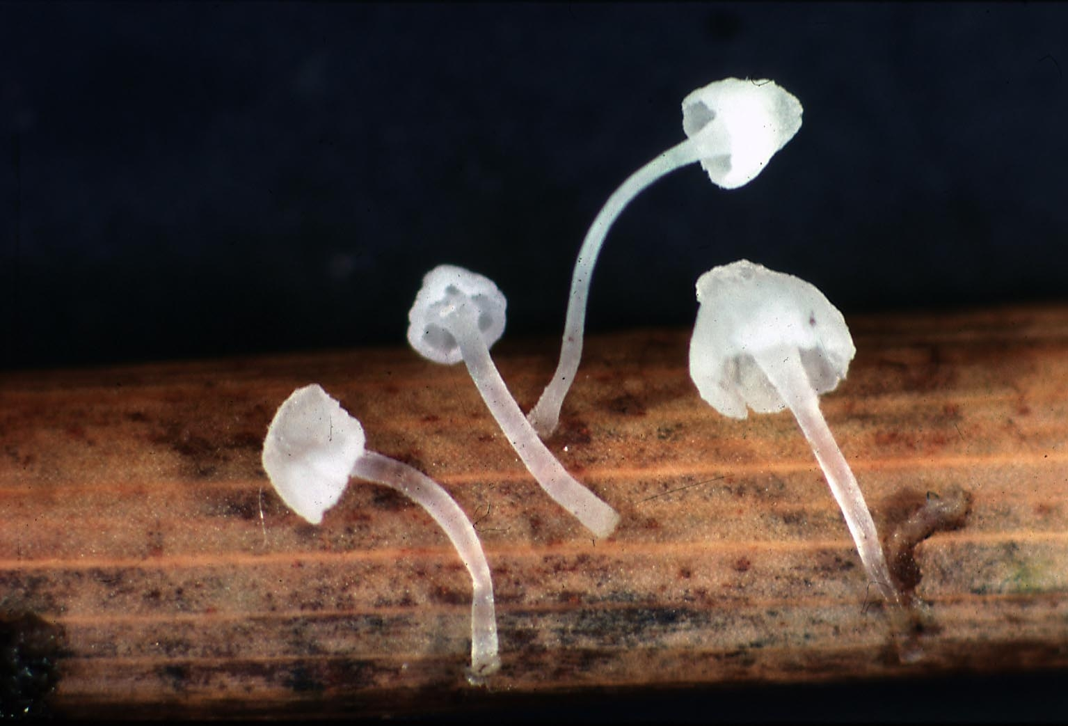 Sopparten svelthette (Mycena oligophylla).